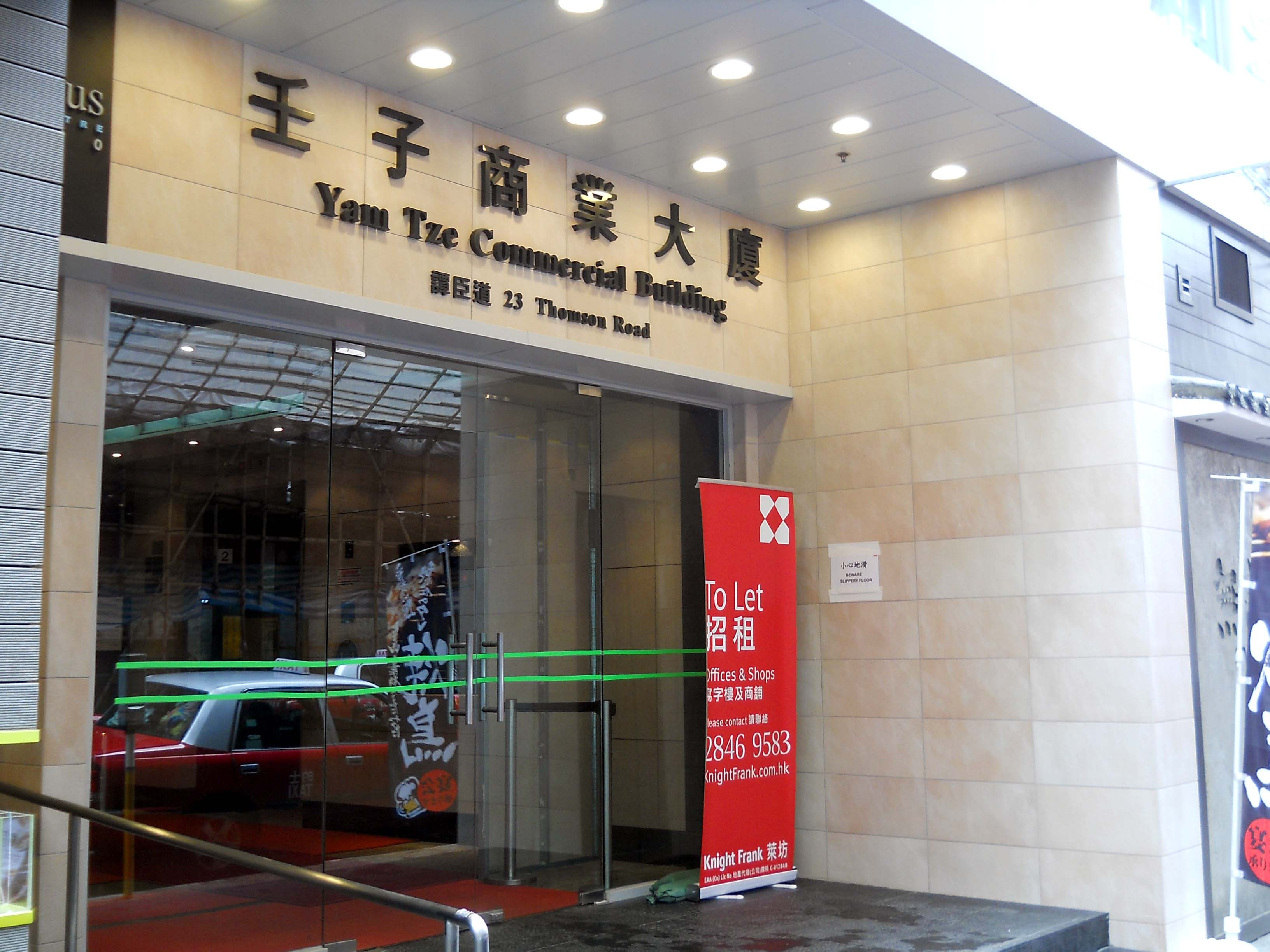 中文（香港）: 壬子商業大廈